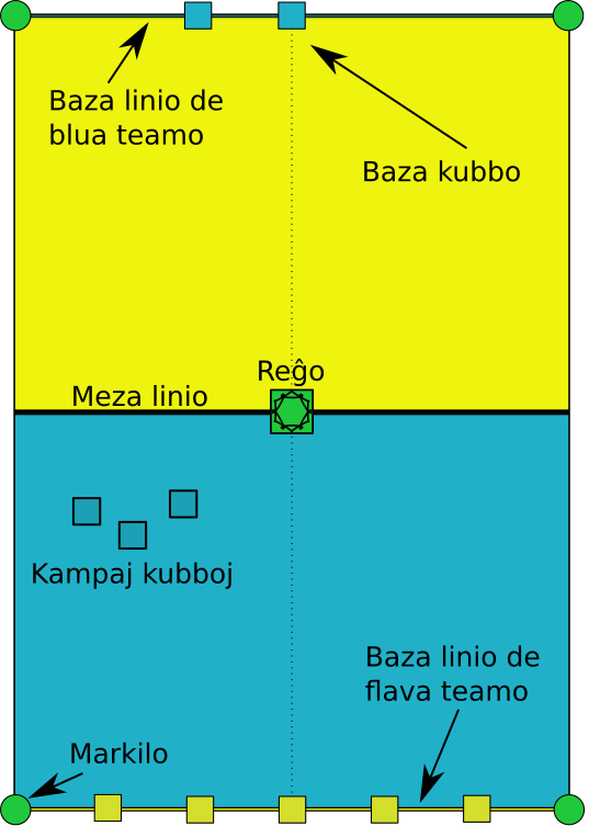 La blua teamo enĵetis tri kubbojn